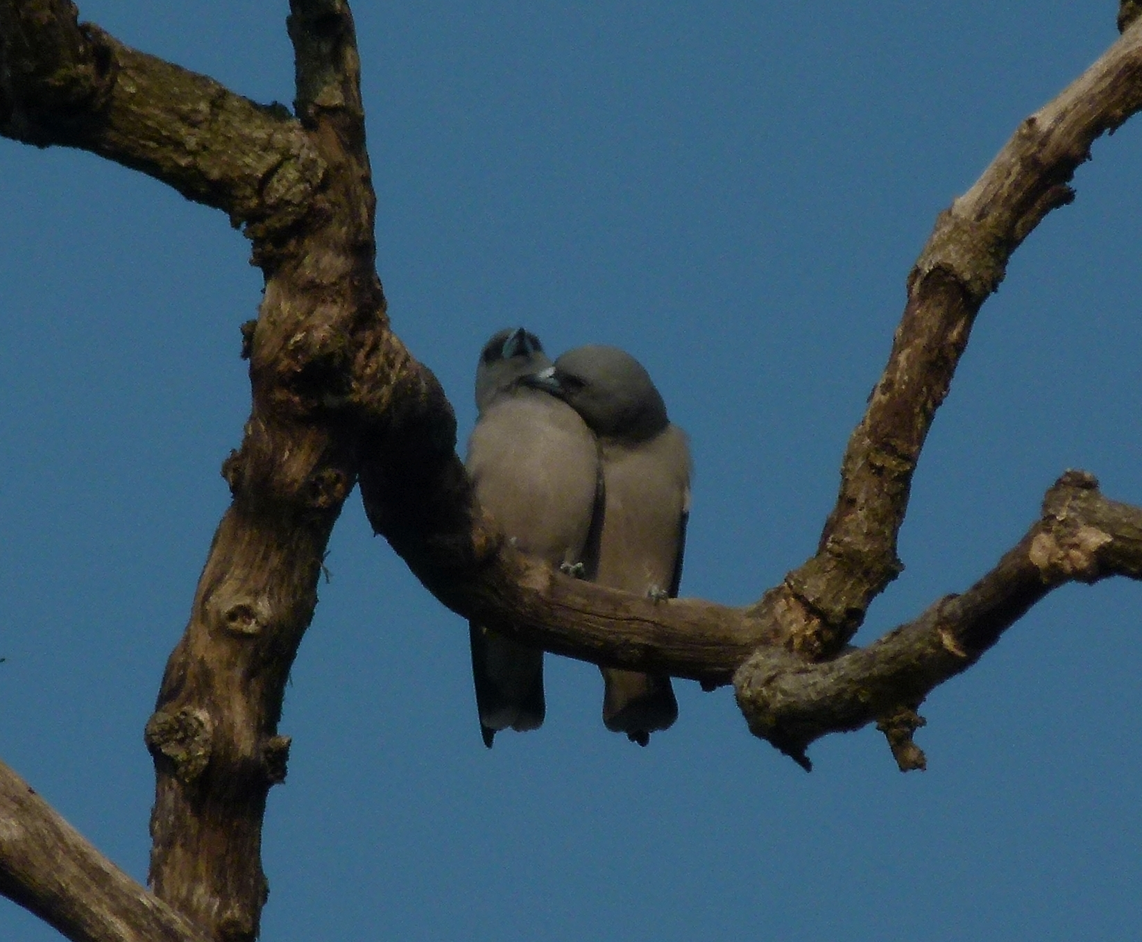 Artamus fuscus allopreening, Yelagiri, Tamil Nadu